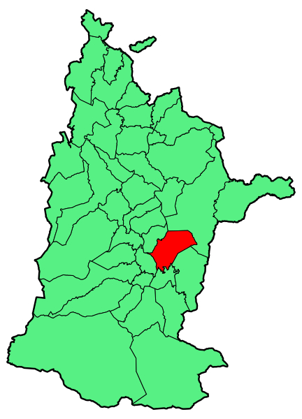 Atharratzeren kokapena zuberoan